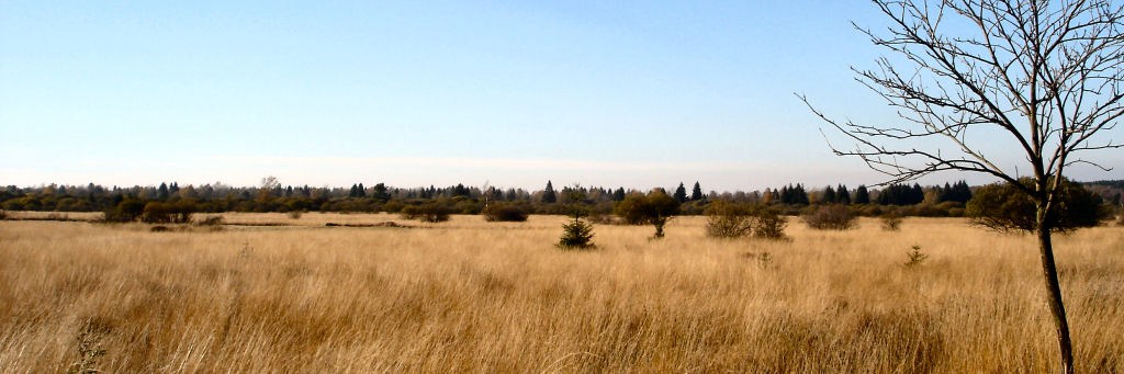 Hohes Venn, Belgien, im Herbst